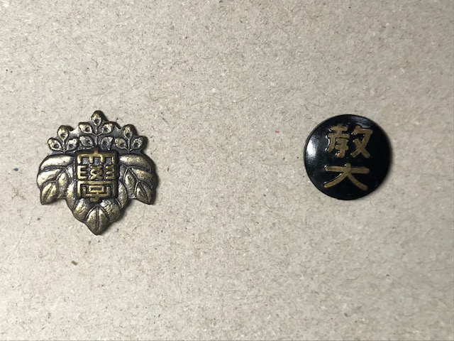 1970年に購入したバッジ